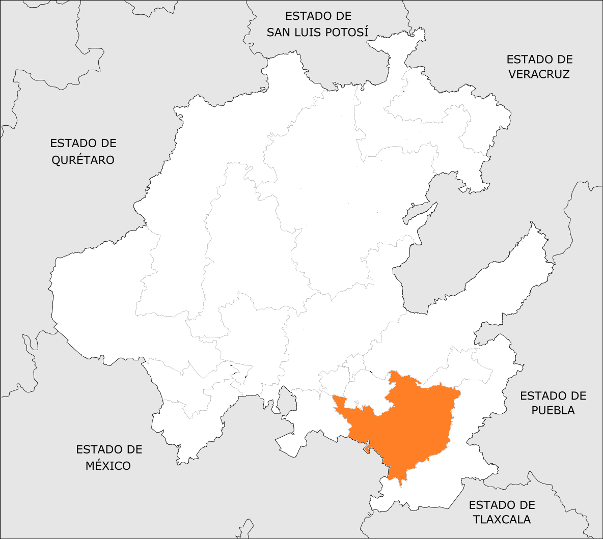 Distrito Electoral Local de Hidalgo 18